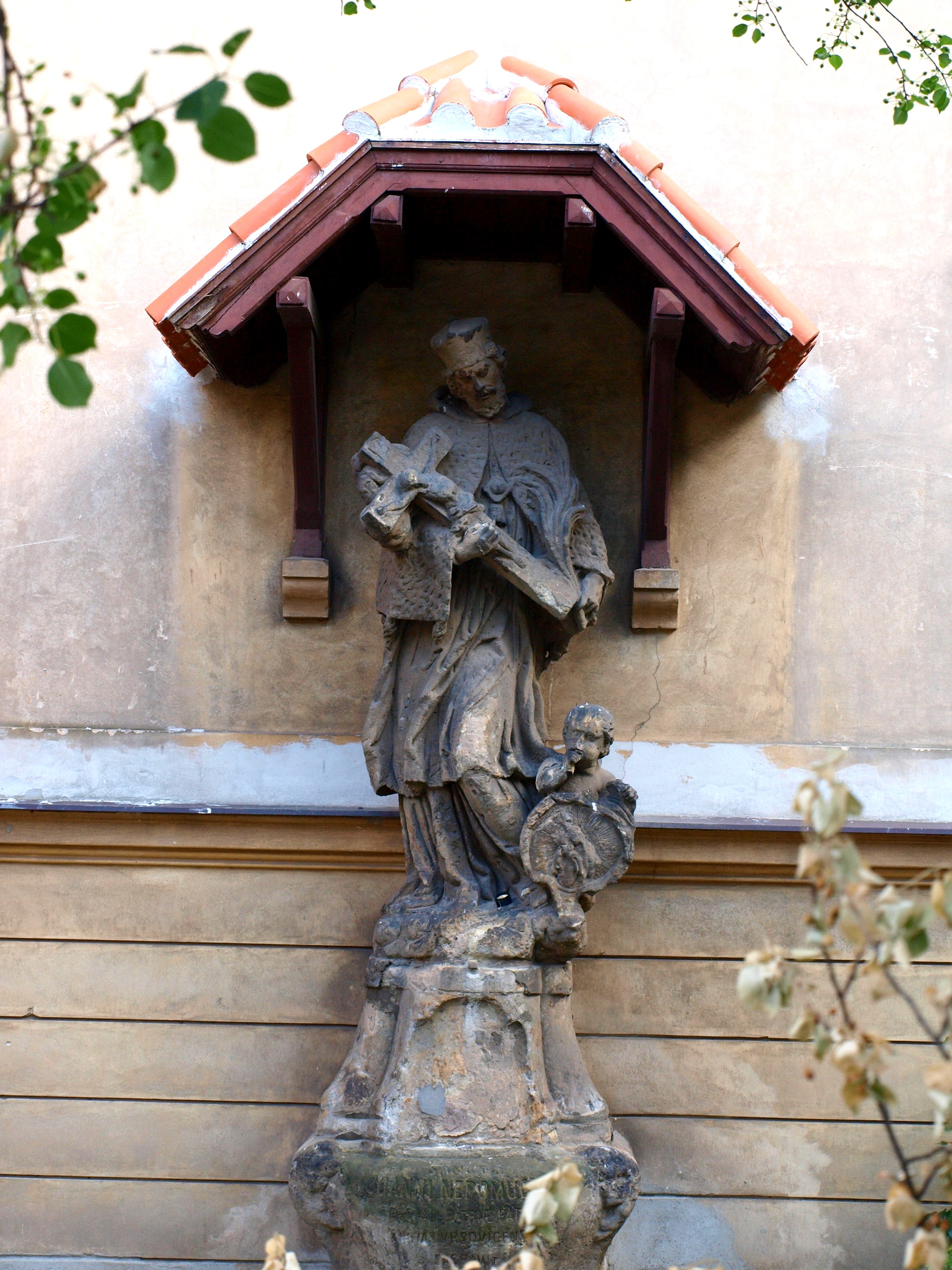 Vršovický Mikuláš